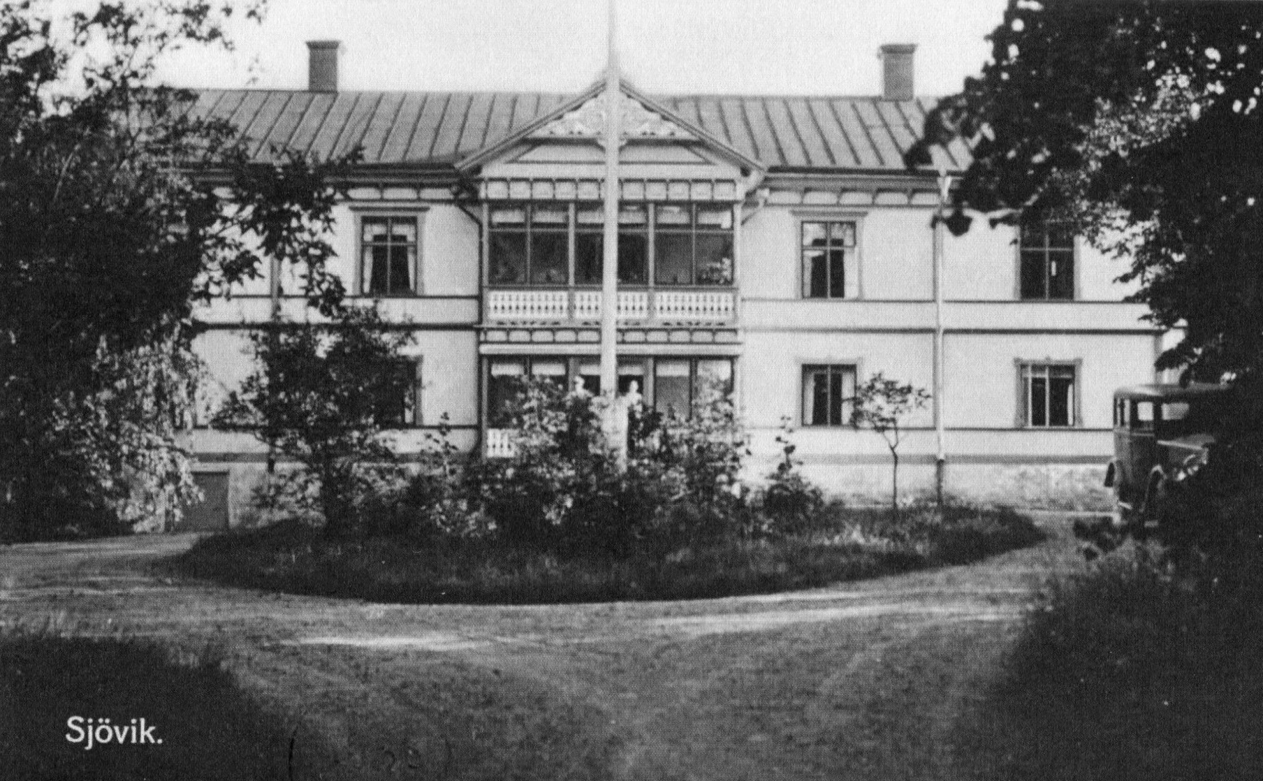 Sjöviks huvudbyggnad på ett vykort från 1928